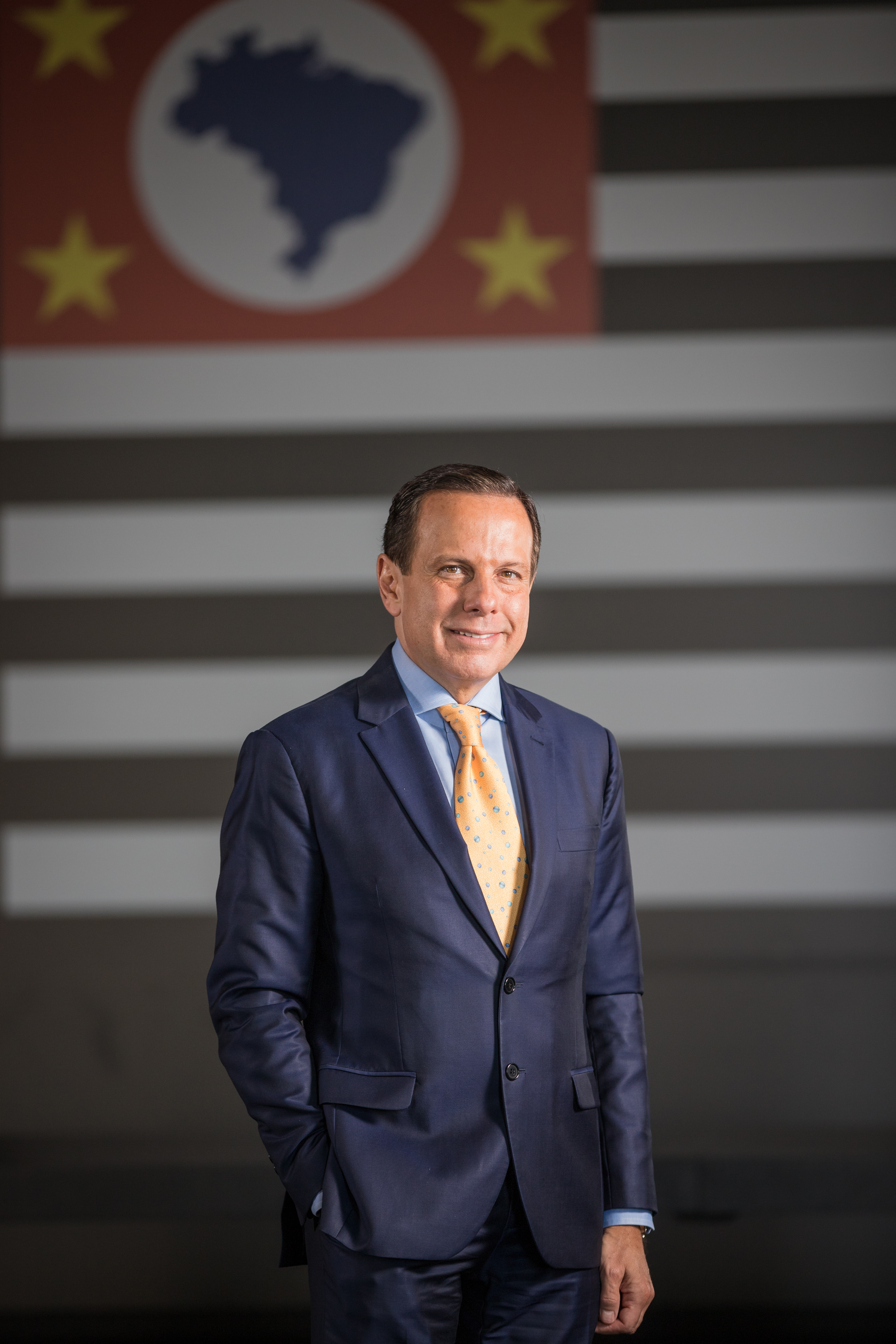 Retratos do governador do Estado de São Paulo, João Doria. Local: São Paulo/SP. Data: 10/06/2019. Foto: Governo do Estado de São Paulo